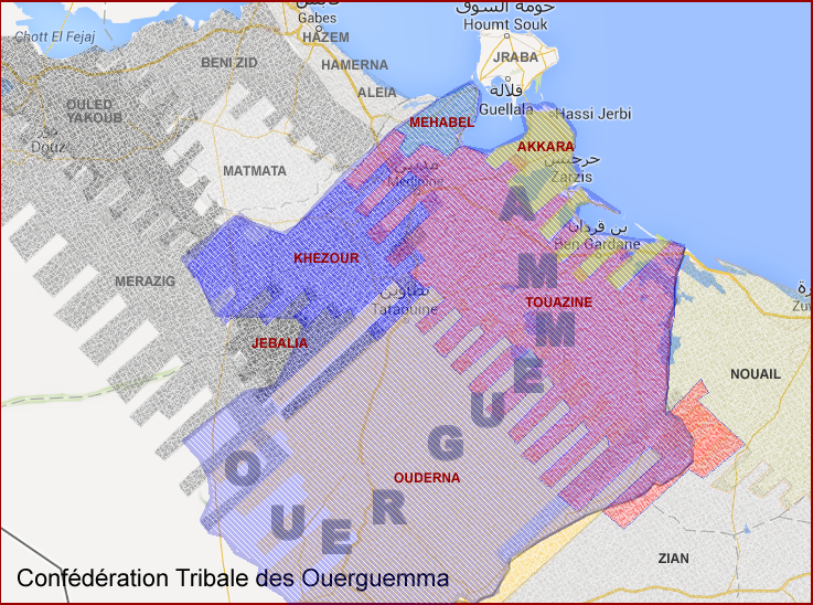 Carte de la Confédération Tribale des Ouerguemma